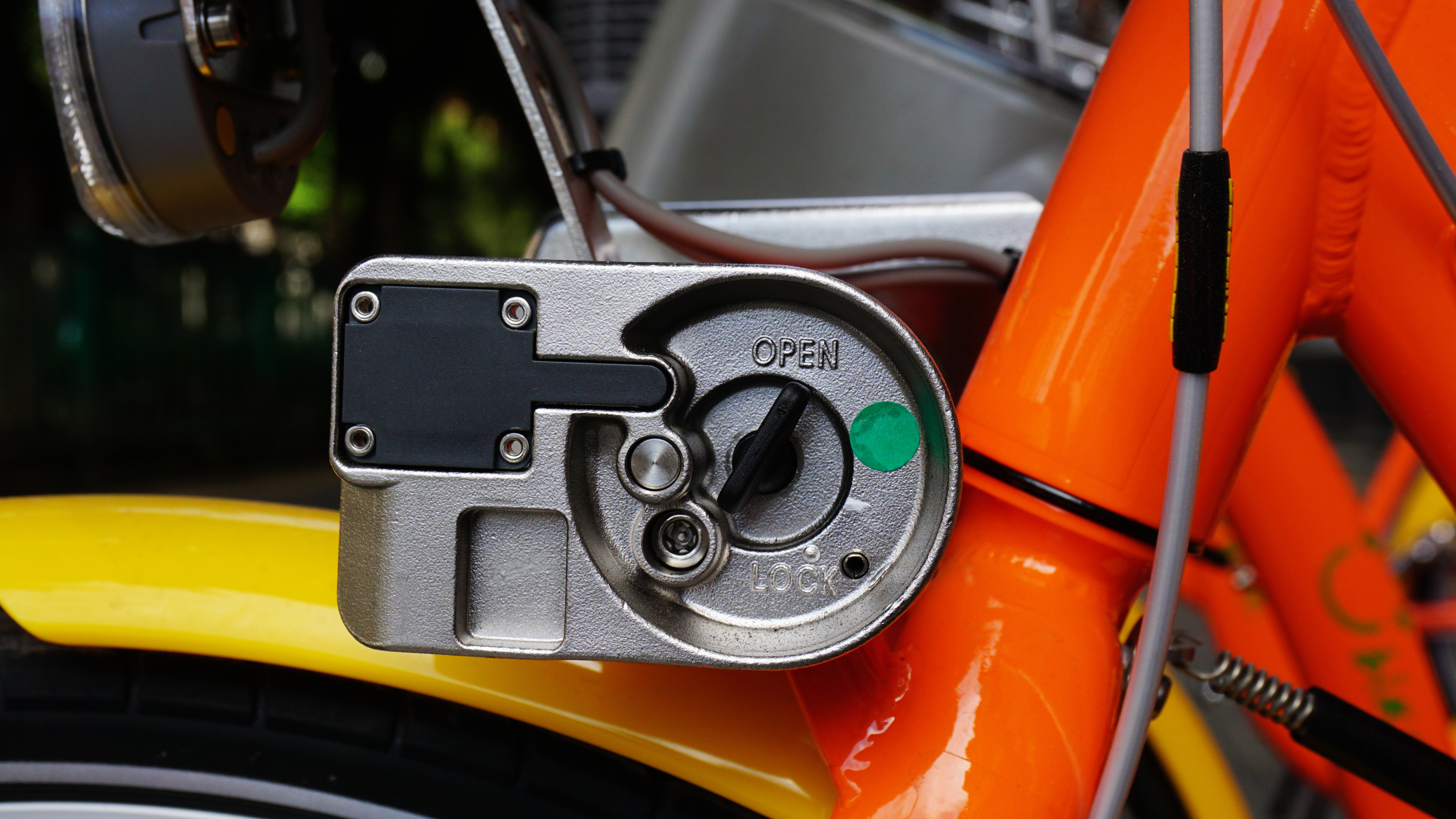 临时停车钥匙